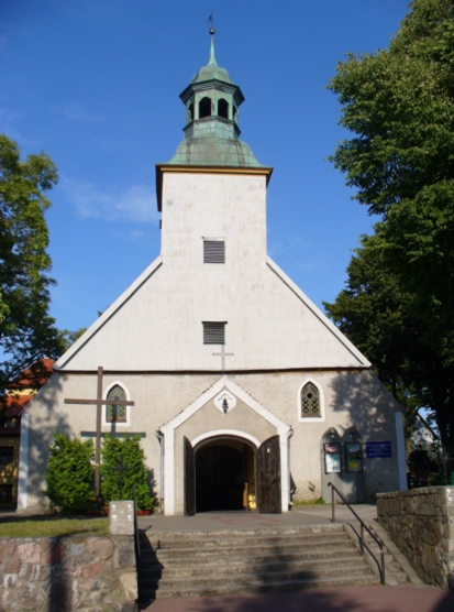 Kościół oblatów w Łebie